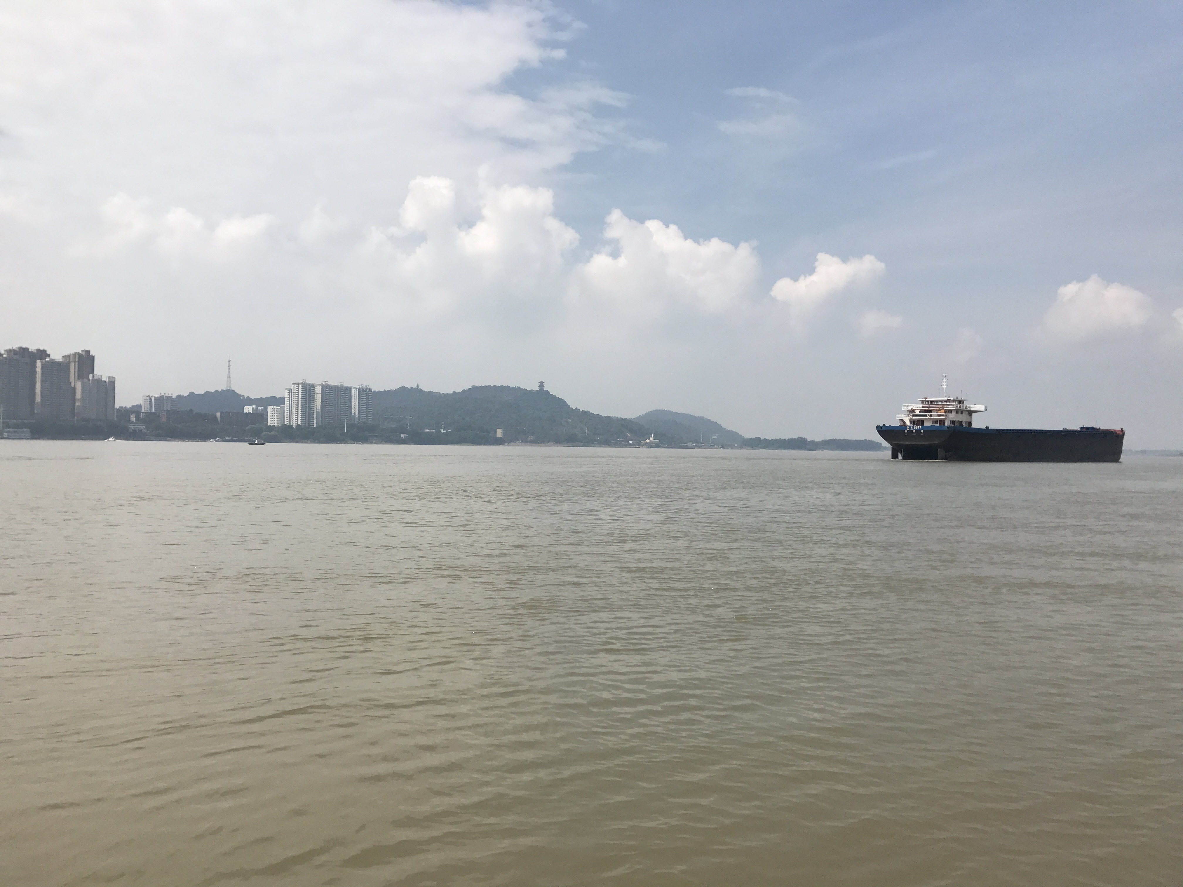 湖北省黄岡市黄州区・フェリーターミナル付近の長江